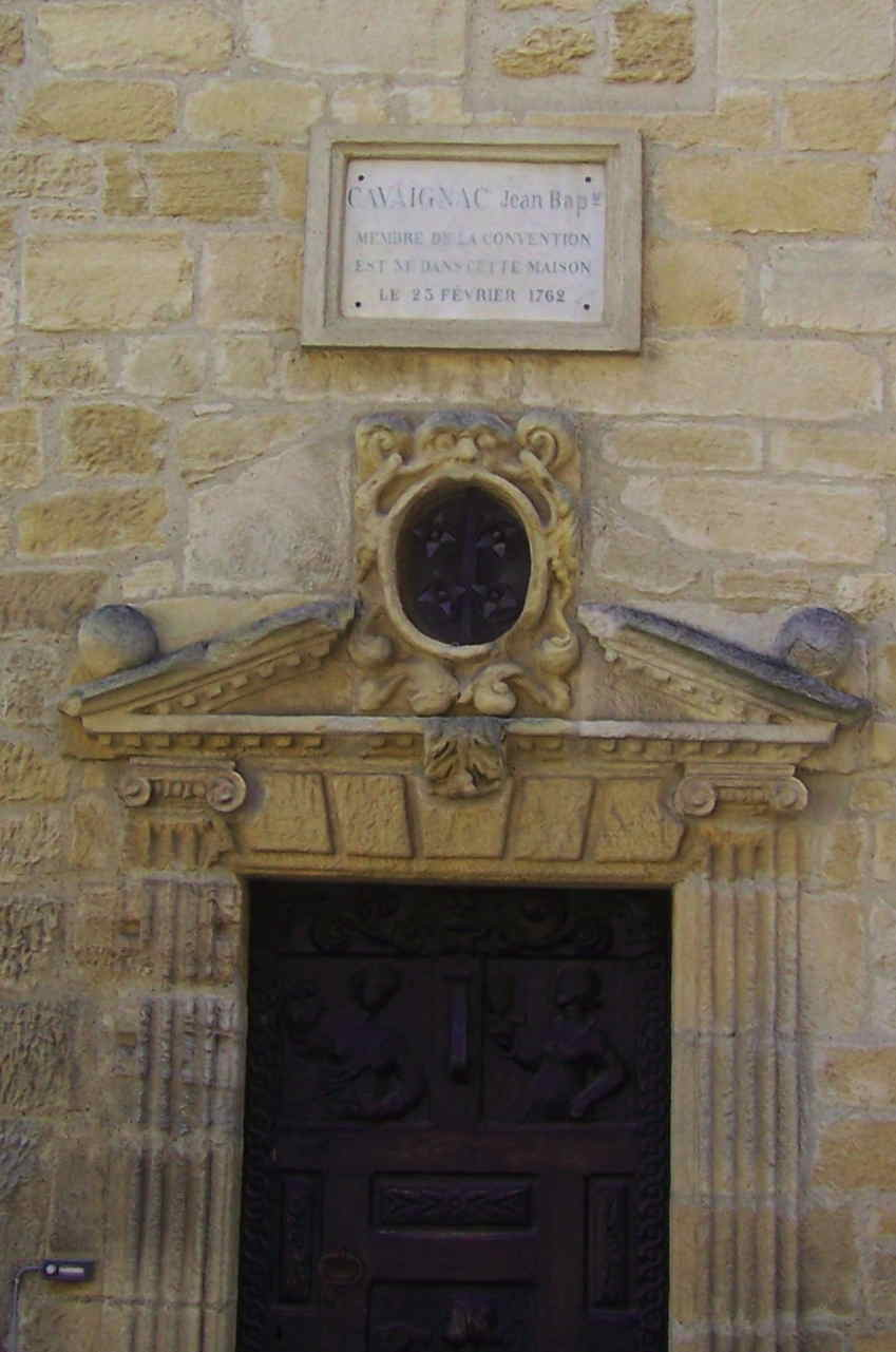 CAVAIGNAC Jean-Baptiste Membre de la Convention est né dans cette maison le 23 Février 1762